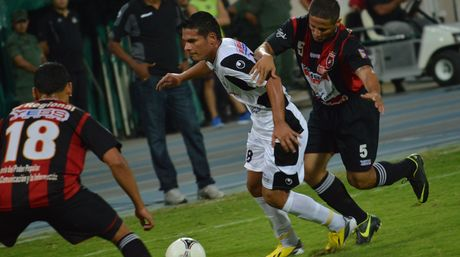 pedro